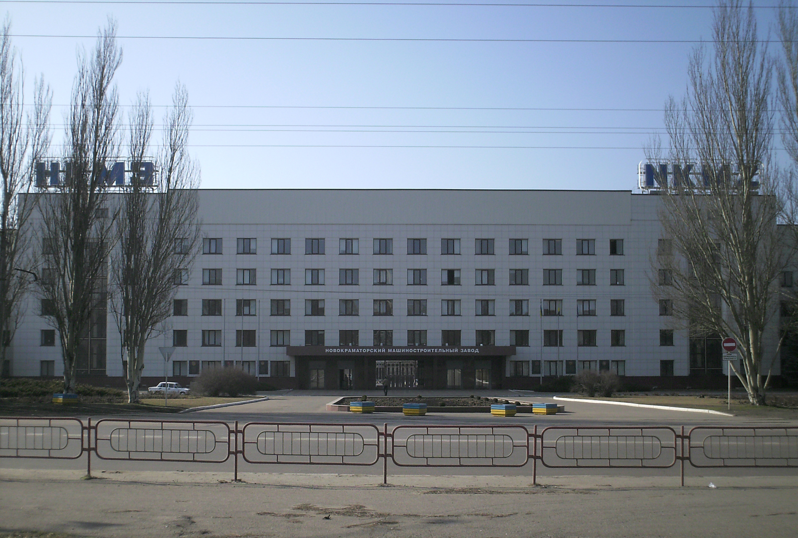 Главконтора НКМЗ